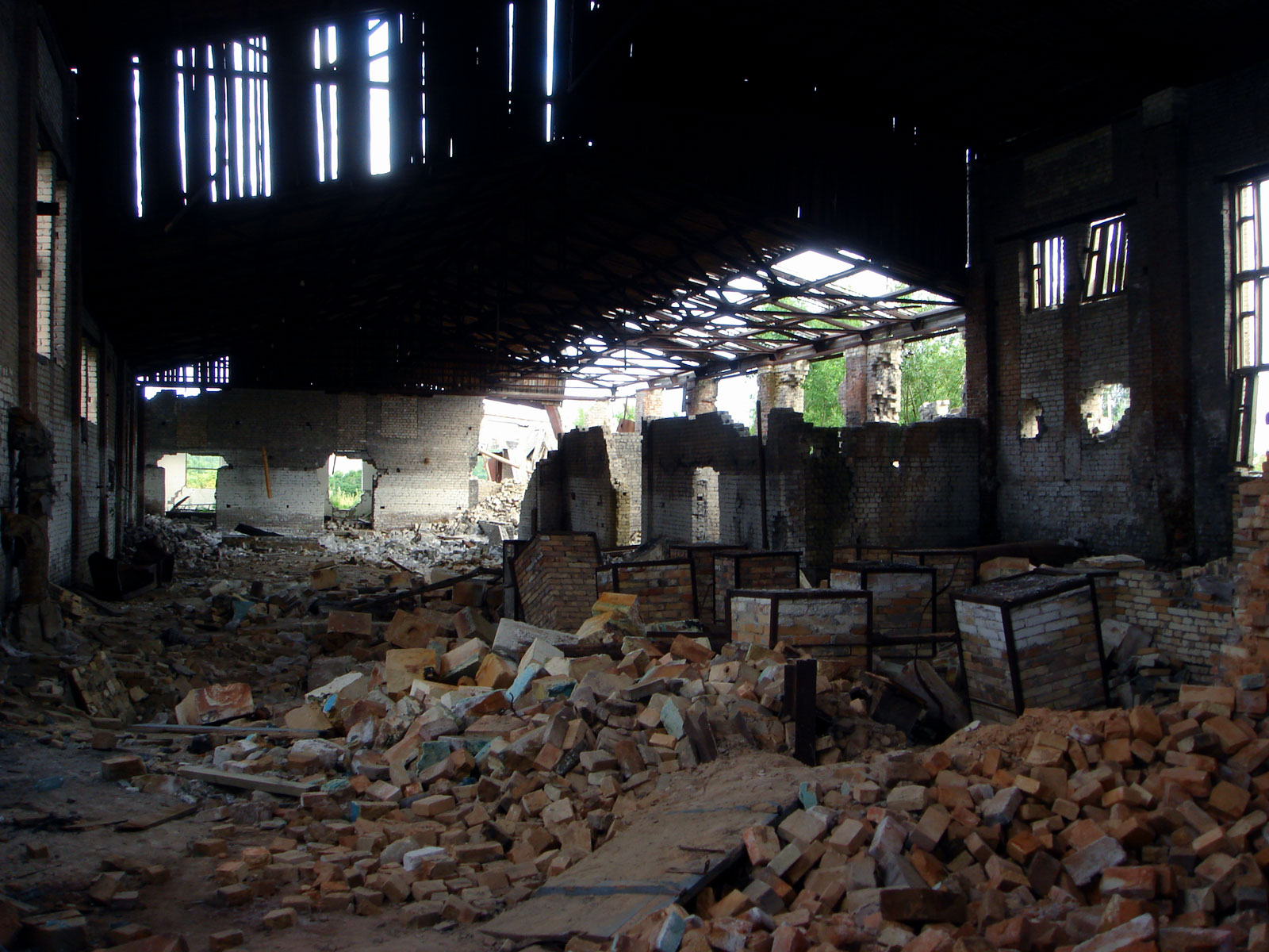 Внутри полуразрушенного стеклозавода в посёлке Красный ЛУч, Нижегородская область, Россия.